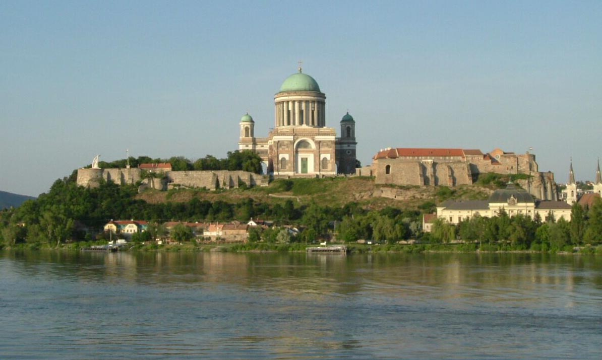 Esztergom